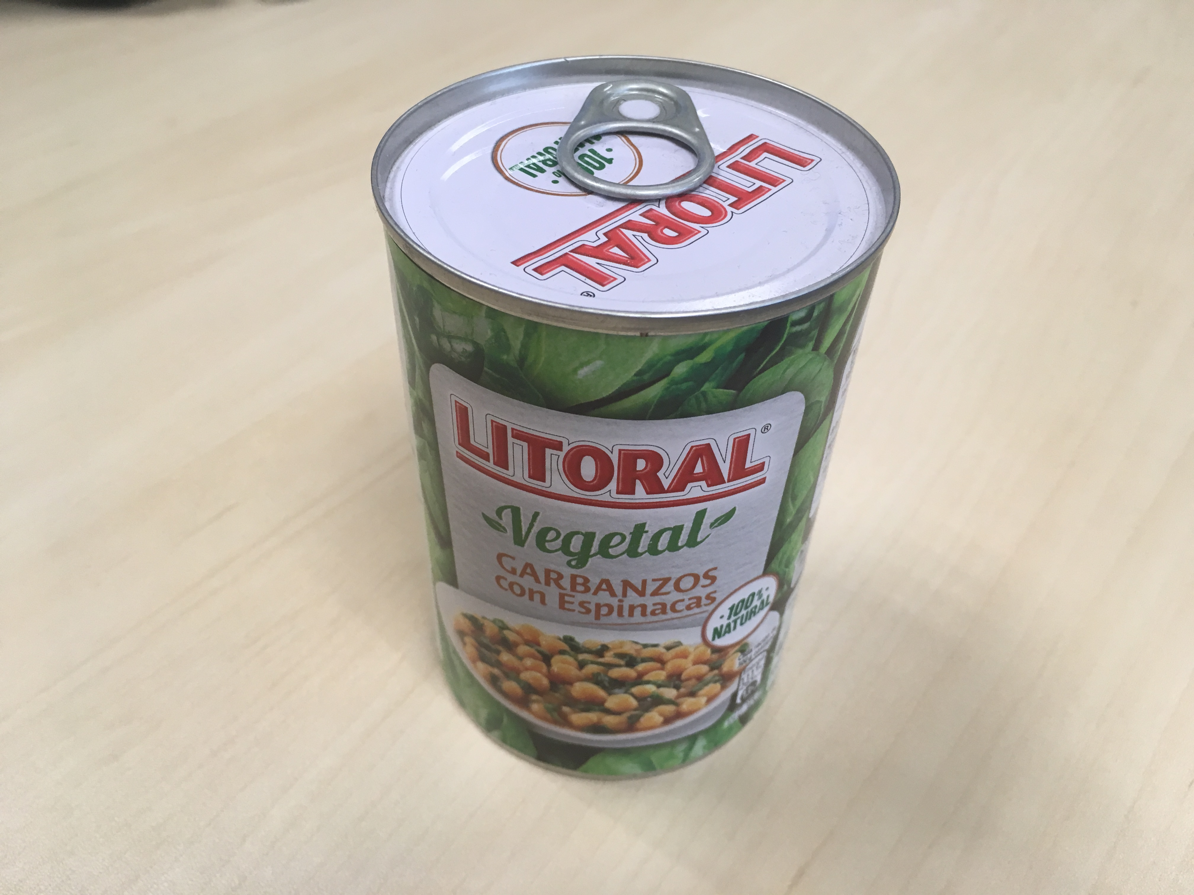 Lata de Litoral Vegetal